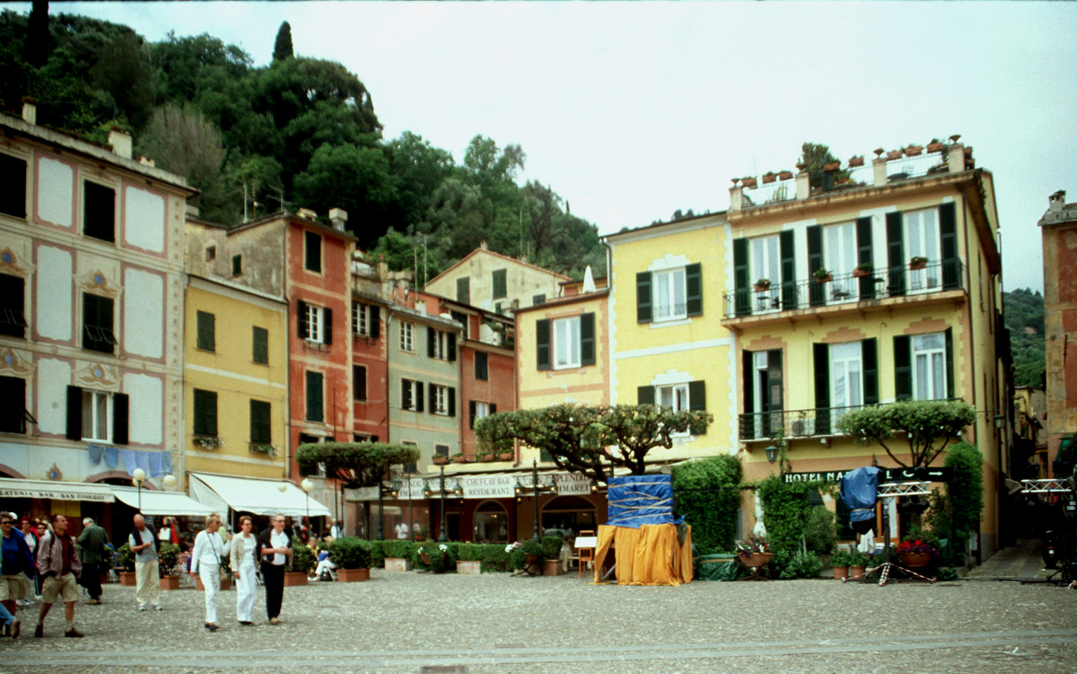 Portofino 2004